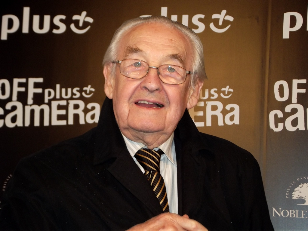 Zdjęcie zrobione podczas premiery zrekonstruowanej cyfrowo „Ziemi Obiecanej”, podczas festiwalu filmowego OFF Plus Camera.